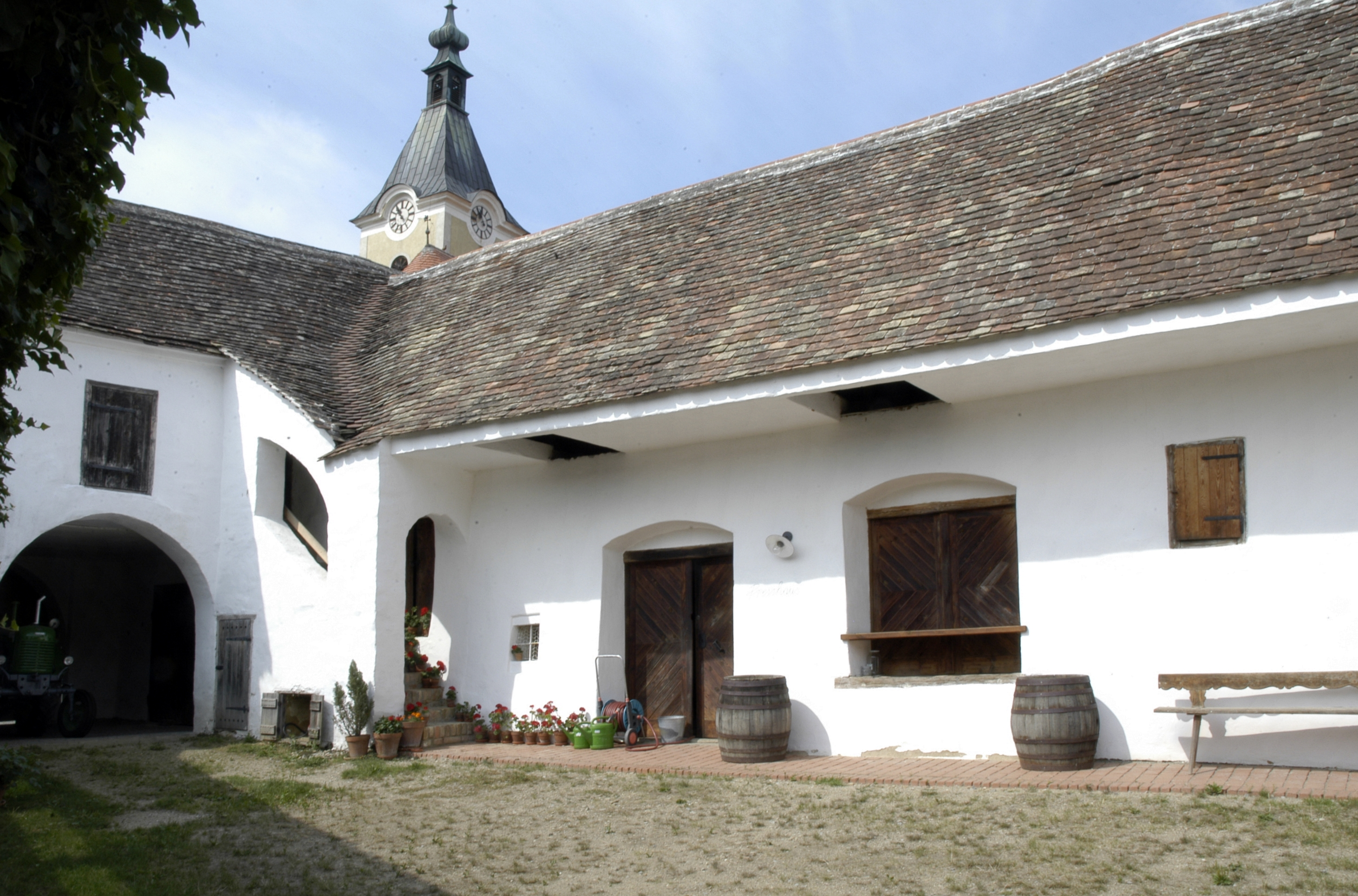 ehemaliger Meierhof in Radlbrunn Innenhof Blick nach Südwest